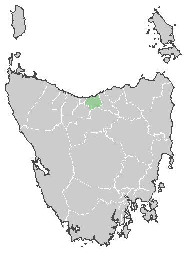 Conseil de Latrobe; Tasmanie, Australie